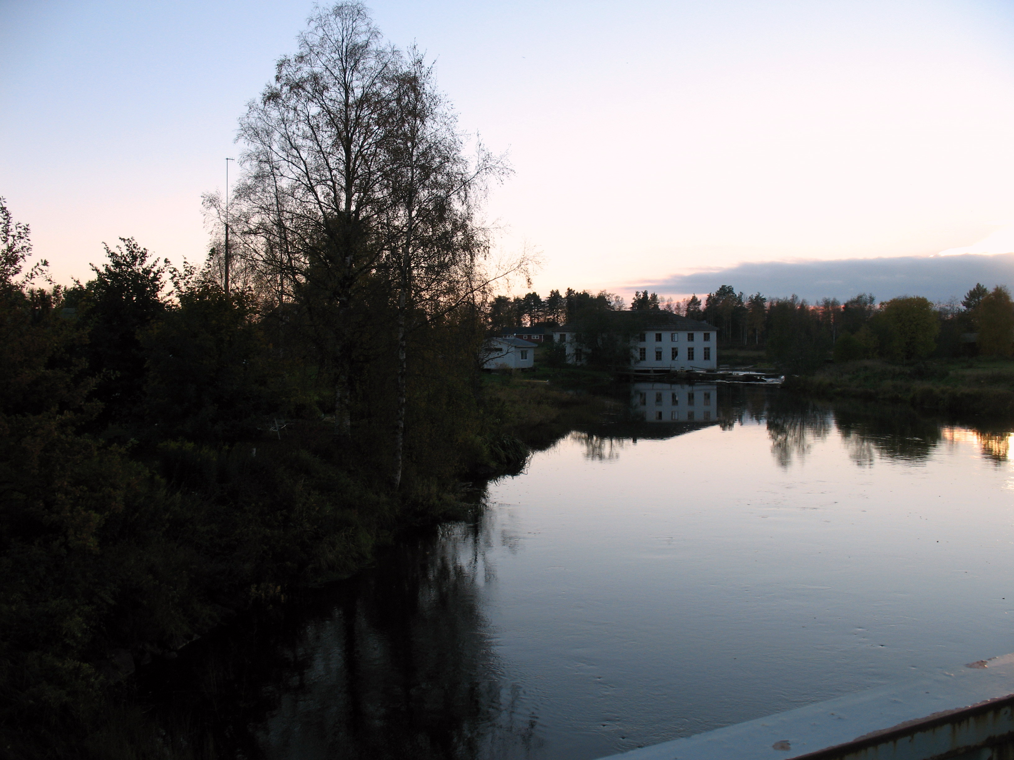 Esse å.